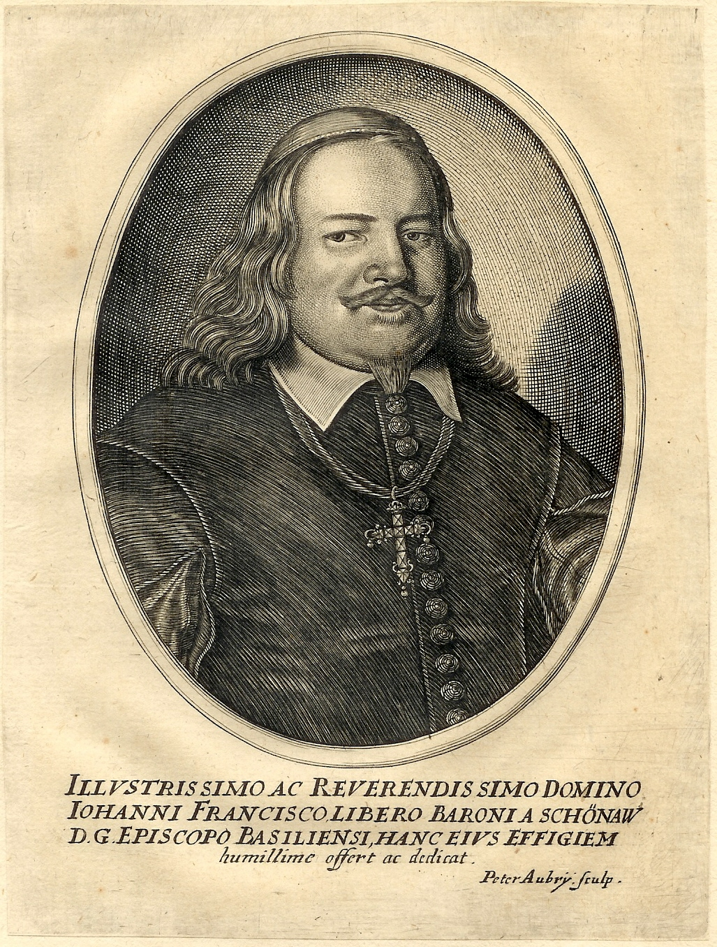 Scan eines Kupferstiches von Peter II. Aubry um 1655 aus eigenem Bestand